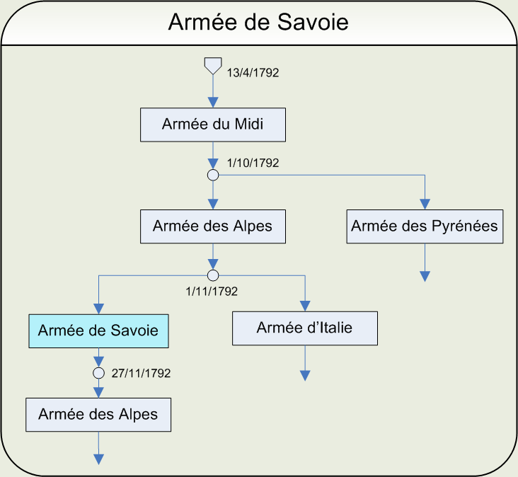 Ordinogramme de l'armée de savoie Dessin réalisé par Papier K